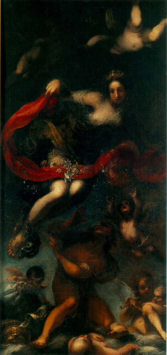 La Aurora